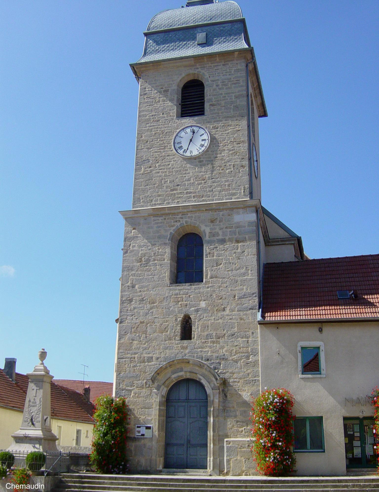 France Doubs Chemaudin Église Saint Alban vue depuis sa façade est - Clocher-Porche